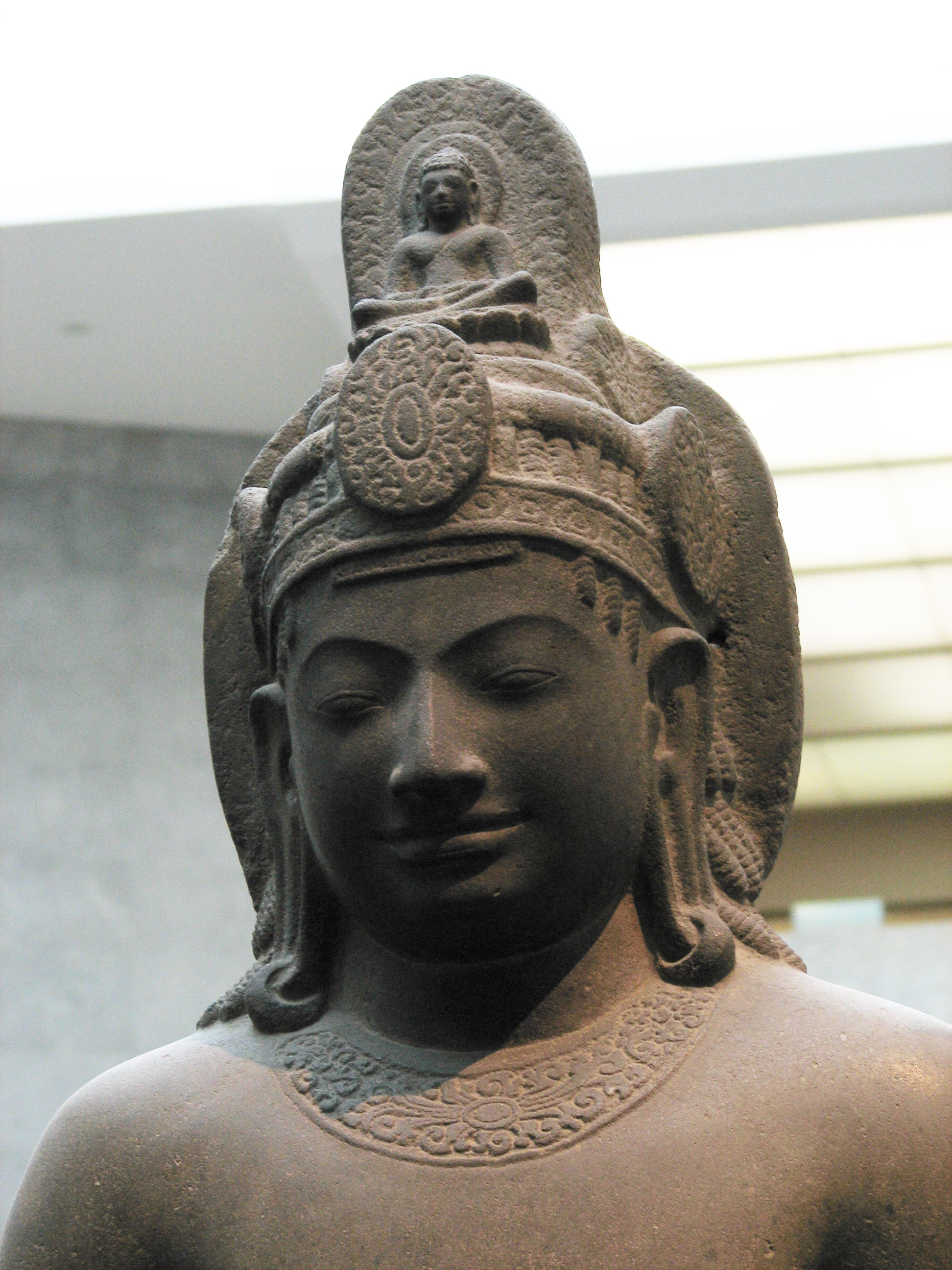 Bodhisattva Avalokiteshvara, VIIè siècle, Cambodge